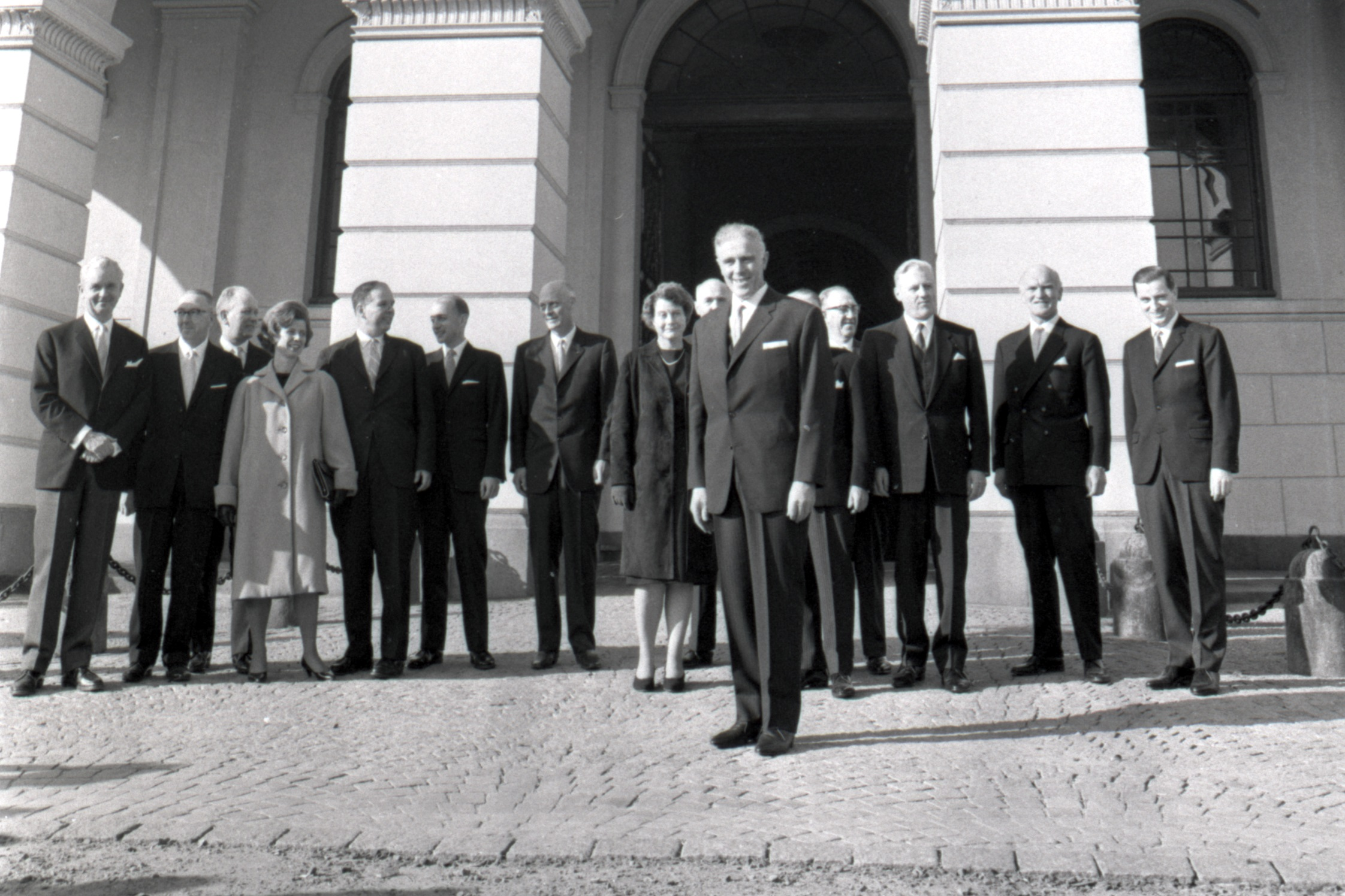 Regjeringen Borten på slottstrappen, 1965.